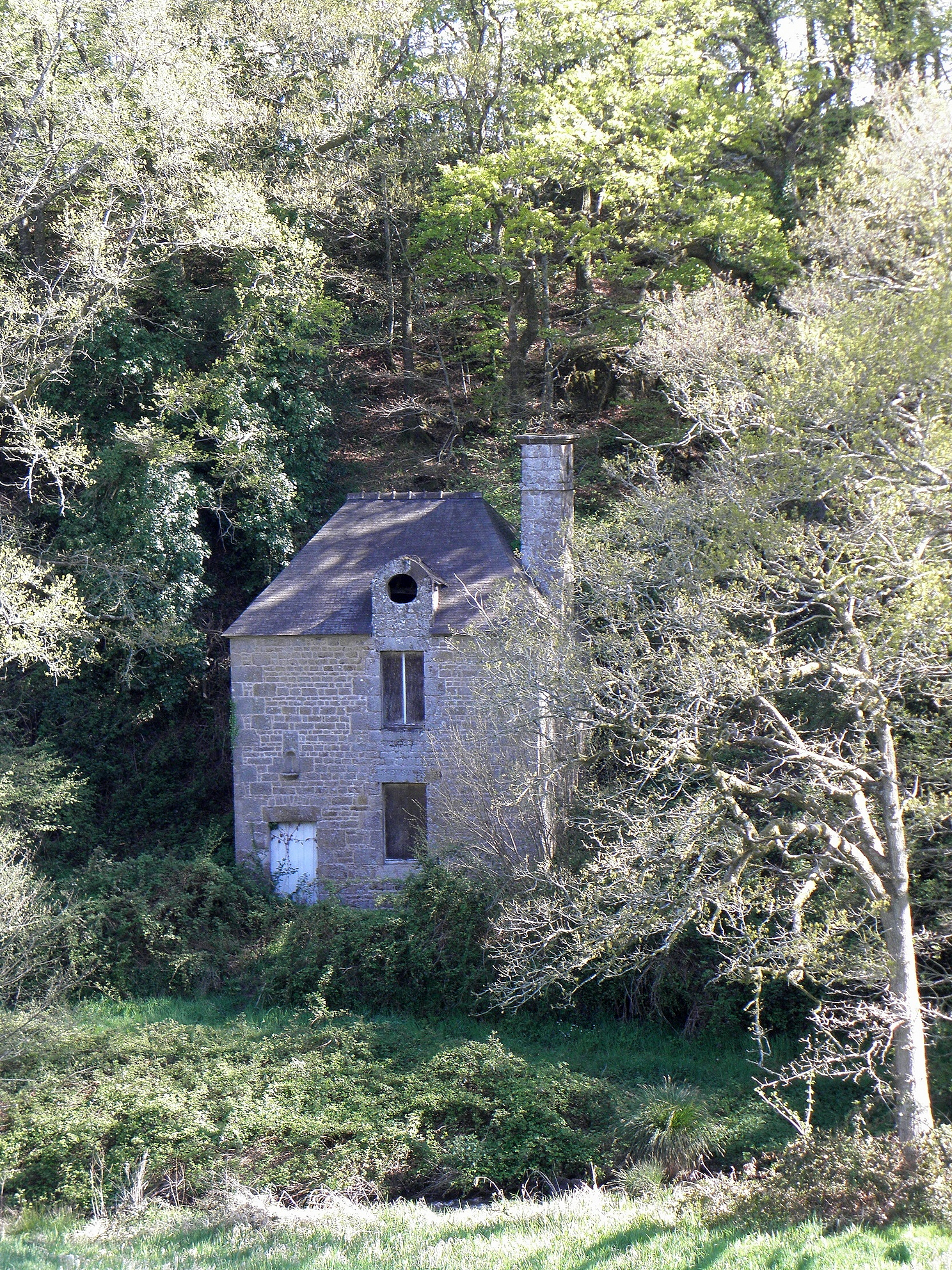 Maison de Malagra, commune de La Bazouge-du-Désert (35). Lieu d'arrestation d'Antoine-Philippe de La Trémoïlle, Prince de Talmont en 1793.